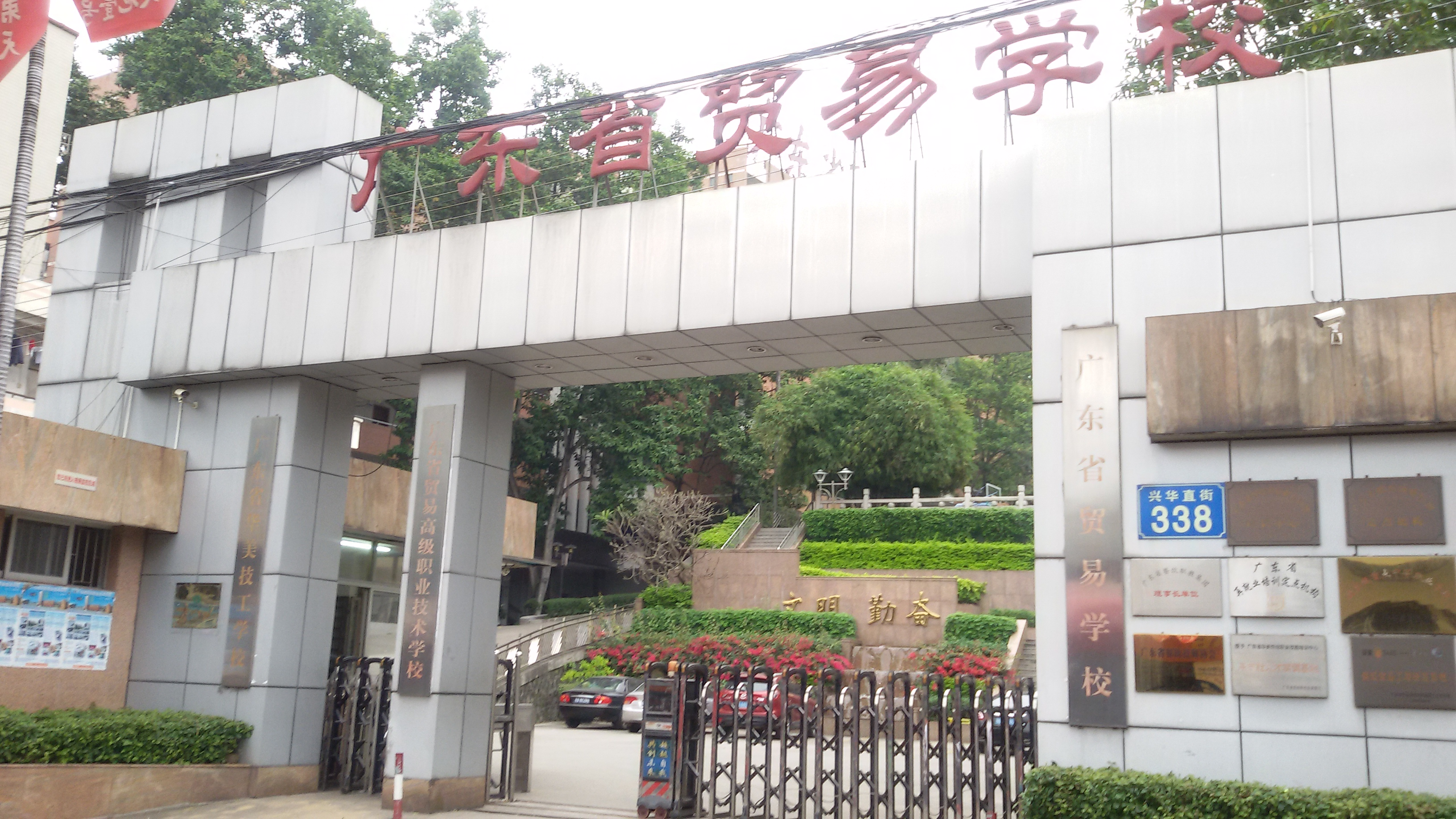 粵語: 廣東省貿易職業技術學校嘅大門